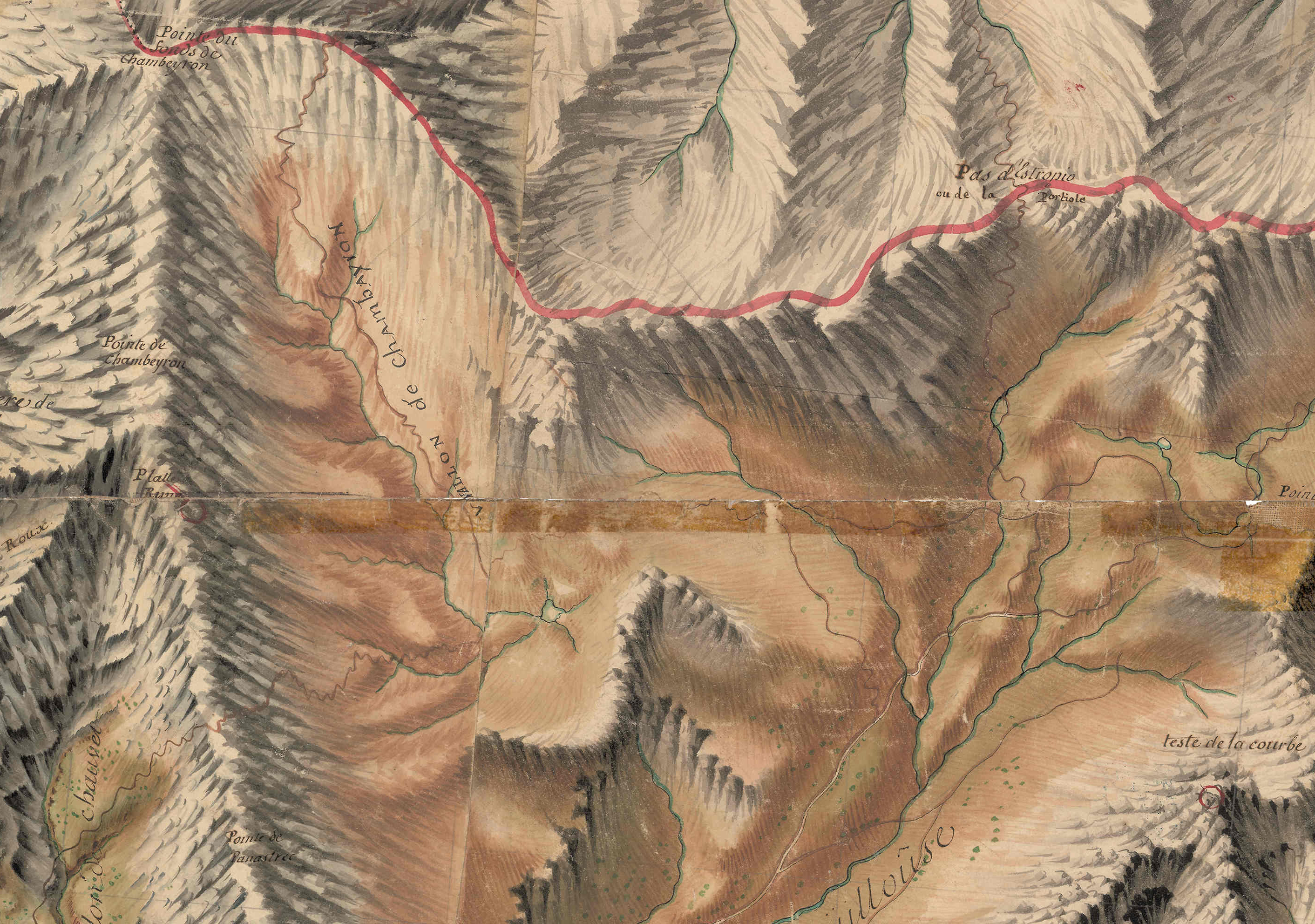 carte de Bourcet numérisé Paris, Nicolas-Alexandre et Olivier-Joseph, Extrait réduc JPG 30% Antoine-H